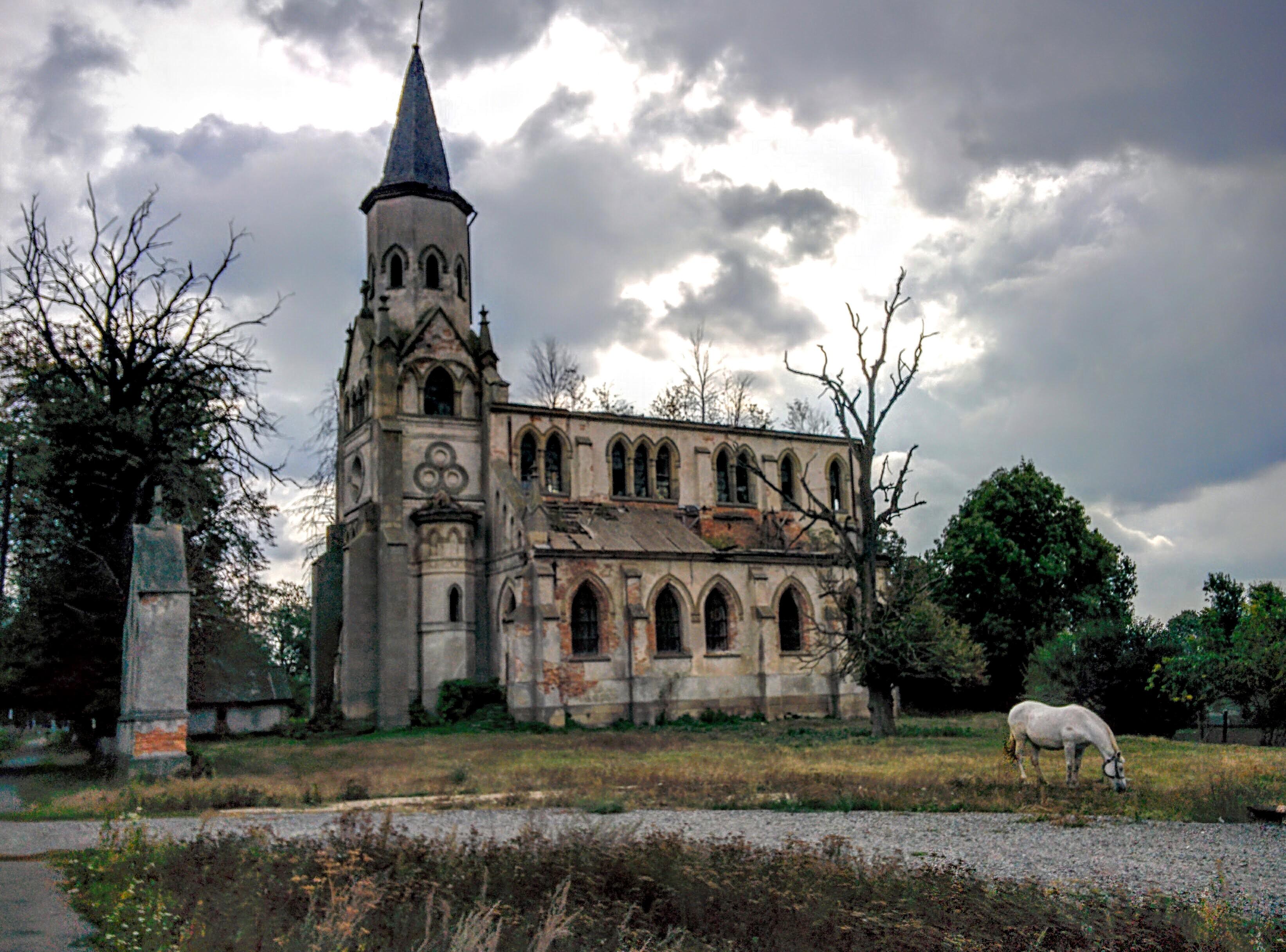 Костел Матері Божої Неустанної Помочі збудований 1907 року. Нині не діє. Село Сороцьке Теребовлянського району Тернопільської області